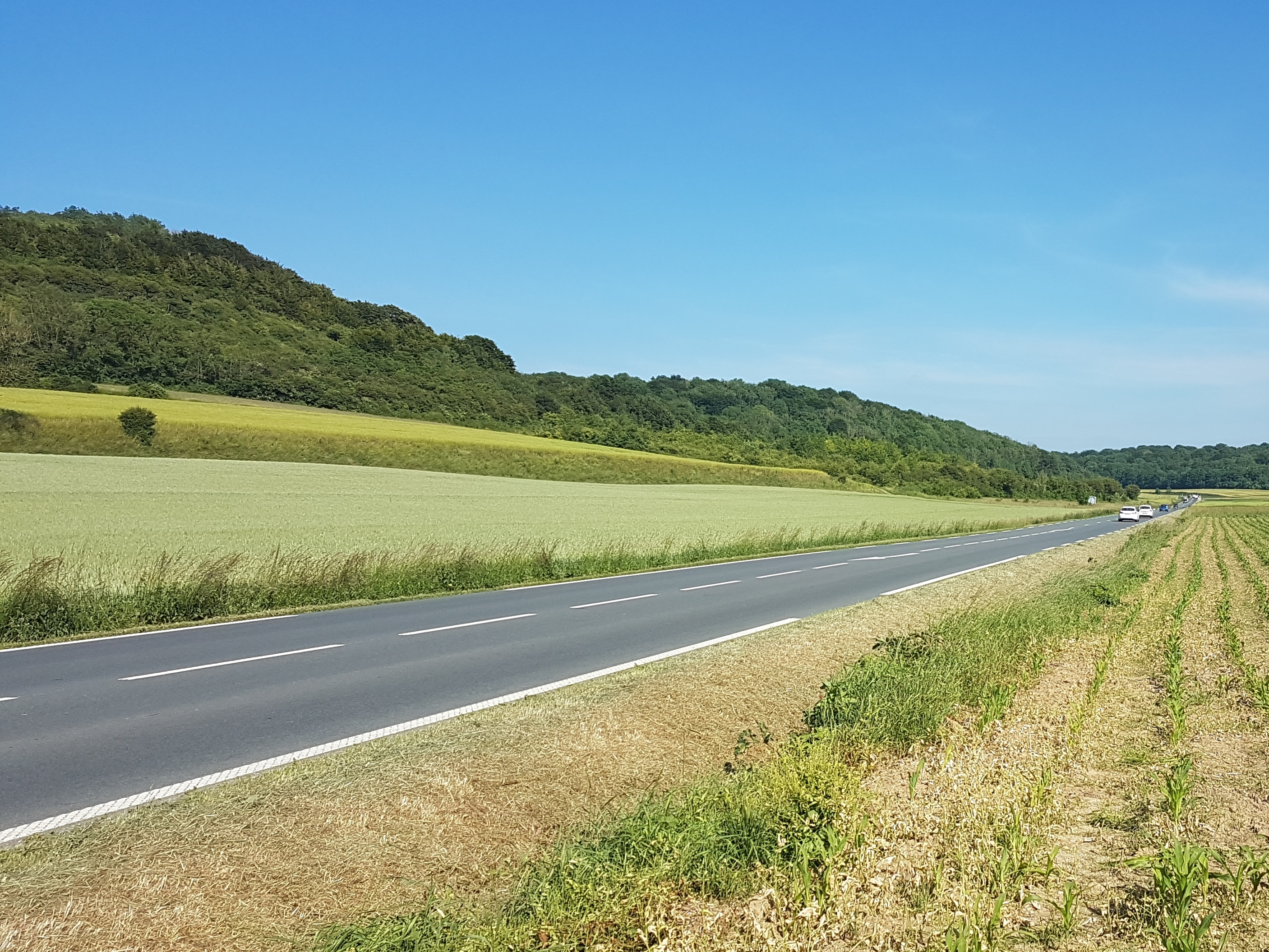 La route nationale 42 à hauteur d'Escœuilles (Pas-de-Calais, France)